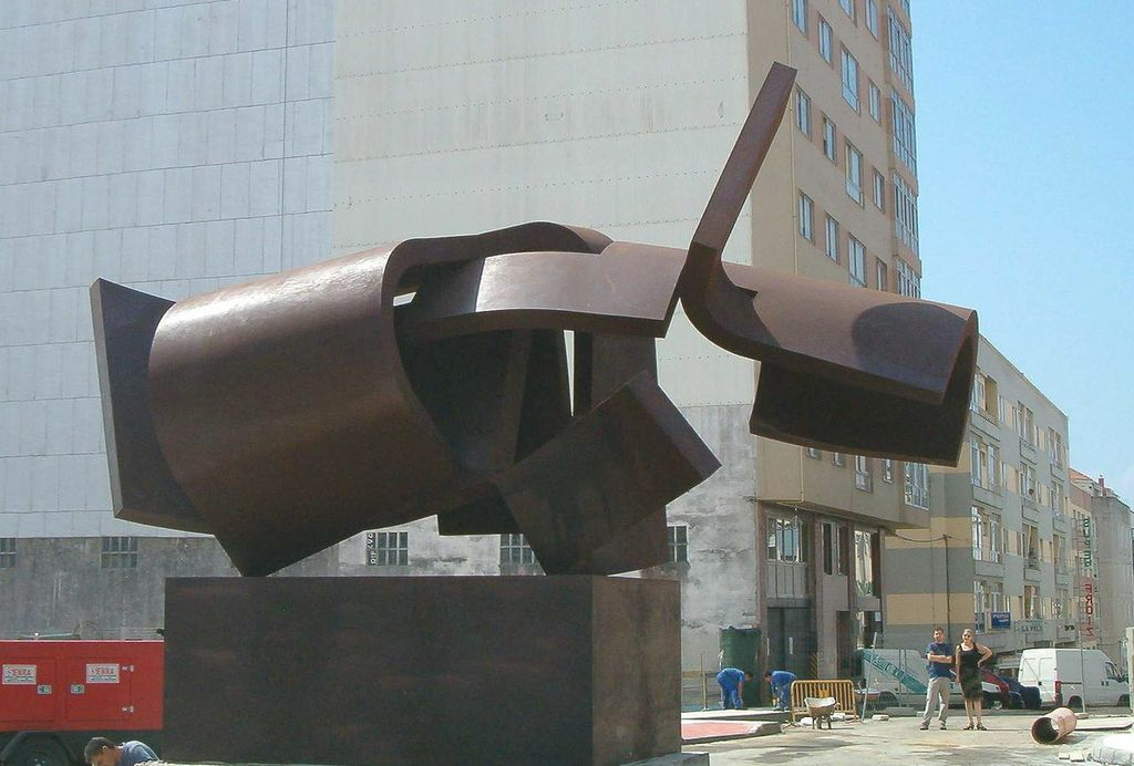 Carlos Albert. Marina 006, 2005. Excmo. Ayuntamiento de Cangas de Morrazo, Pontevedra.